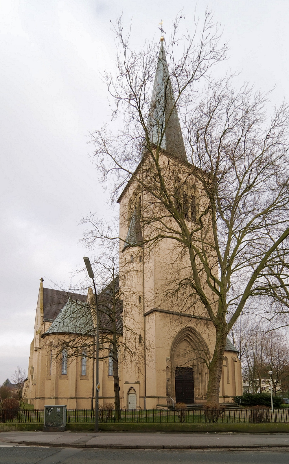 Katholische Kirche St. Barbara im Stadtbezirk Dortmund-Eving